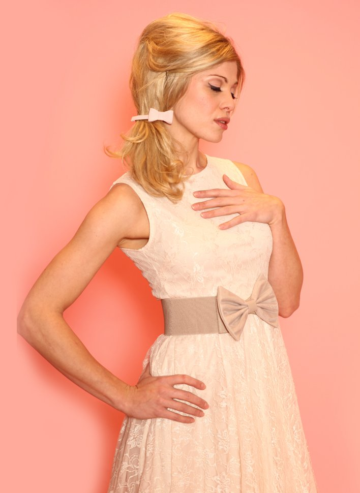 Jess Donckers, Belgisch model. Crop van afbeelding Jess-donckers-1302992567.jpg die een "stempel" bevatte.